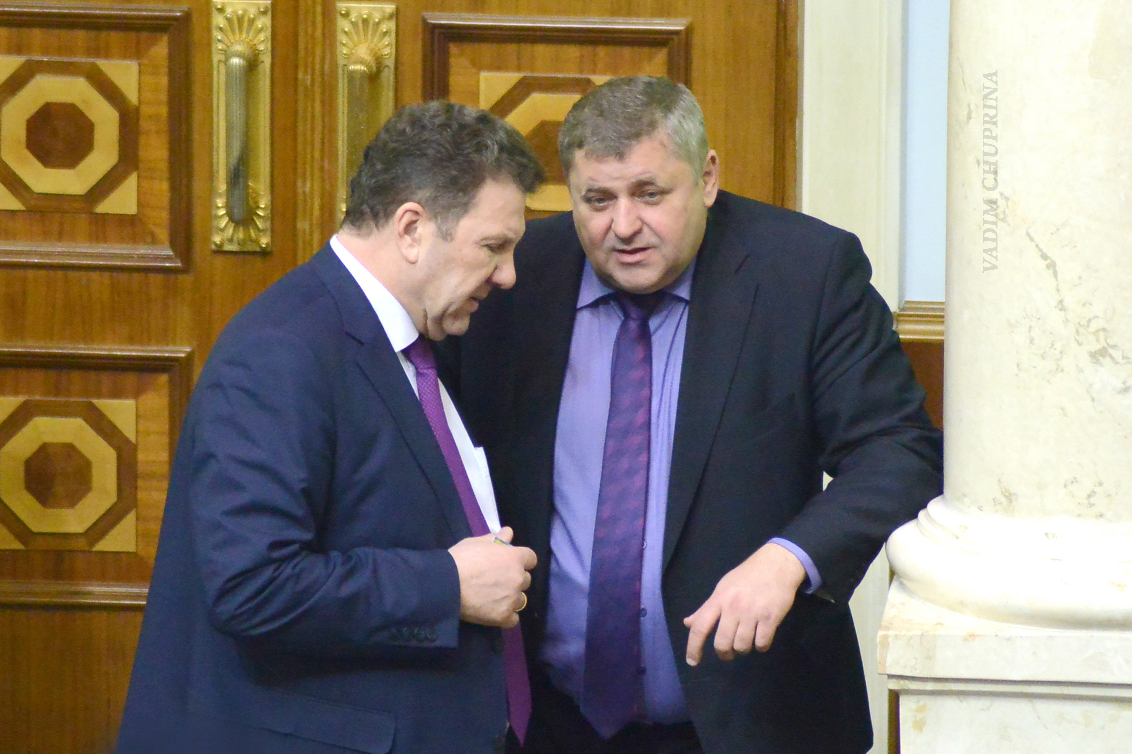 ВЕРХОВНАЯ РАДА УКРАИНЫ 2016 , фото Вадим Чуприна